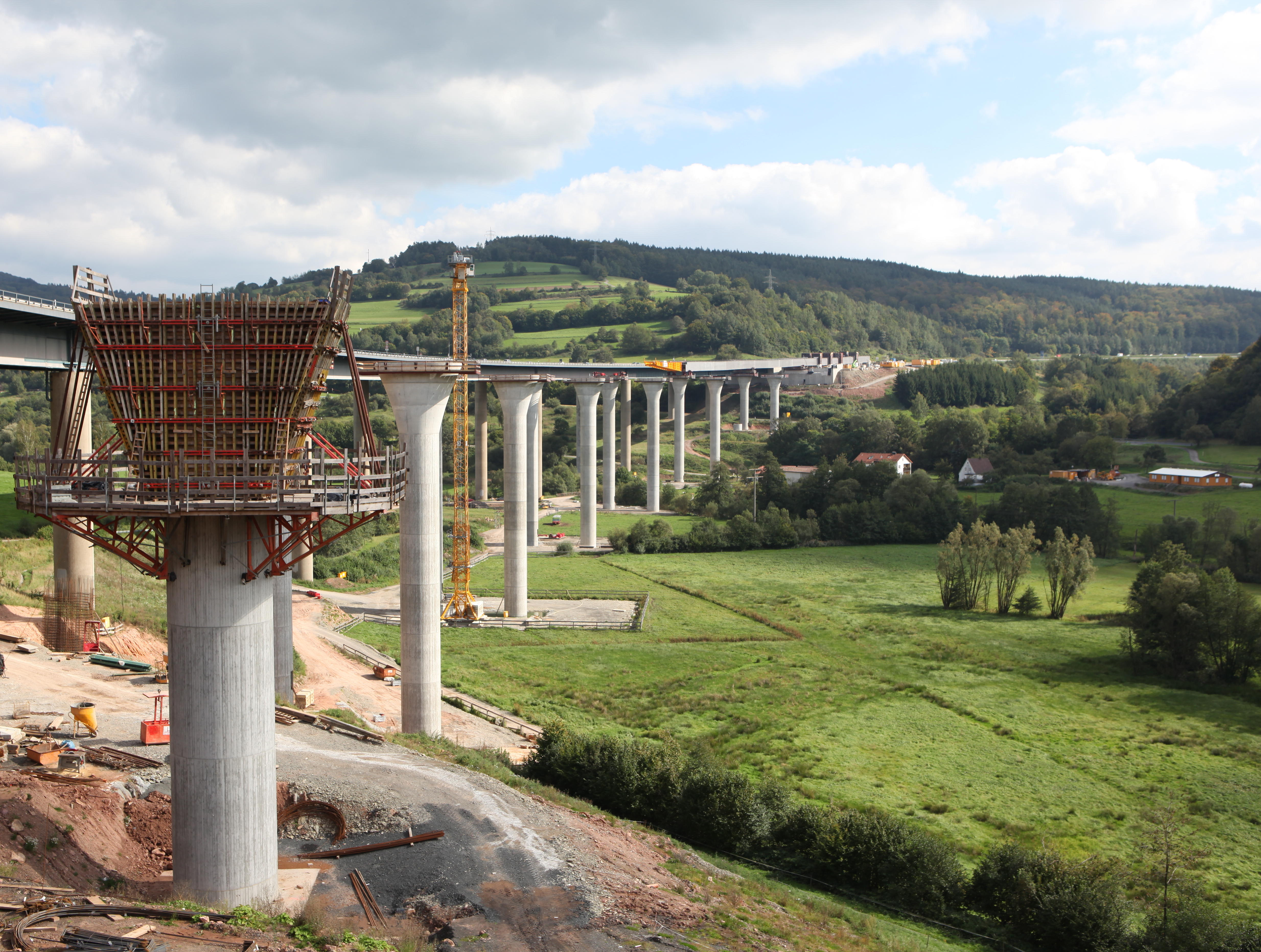 Sinntalbrücke bei Bad Brückenau in Unterfranken